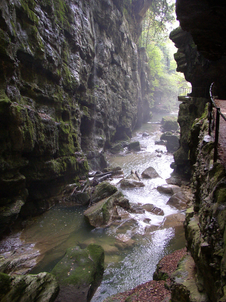 Gorges du Taubenloch, Bienne